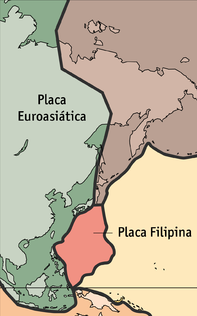 Placas Filipina y Euroasiatica limites